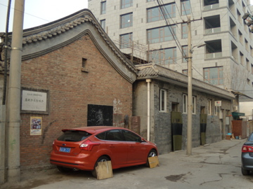 嵩祝寺山门等建筑原址处的大楼